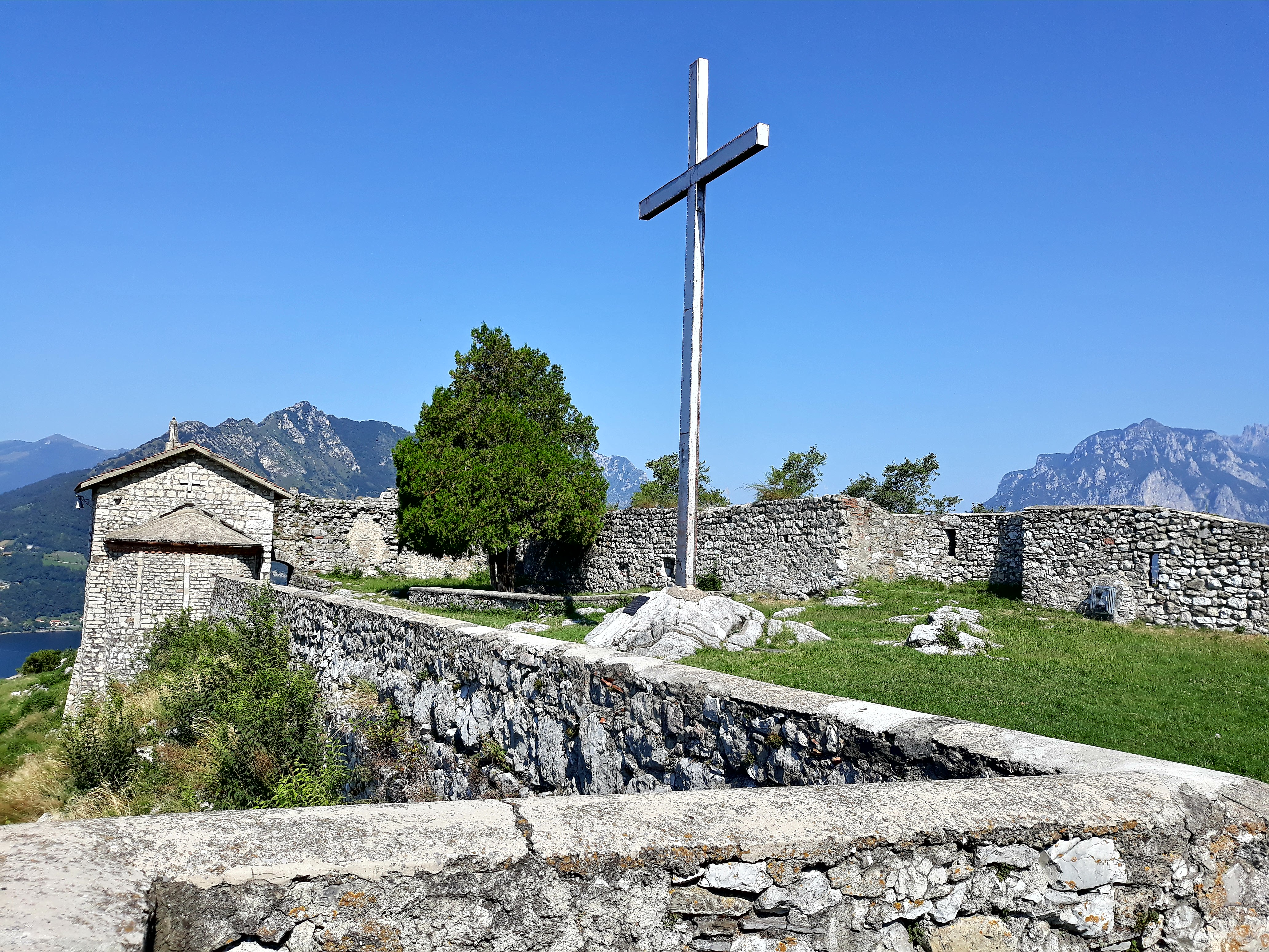 Interno del Castello dell'Innominato a Somasca